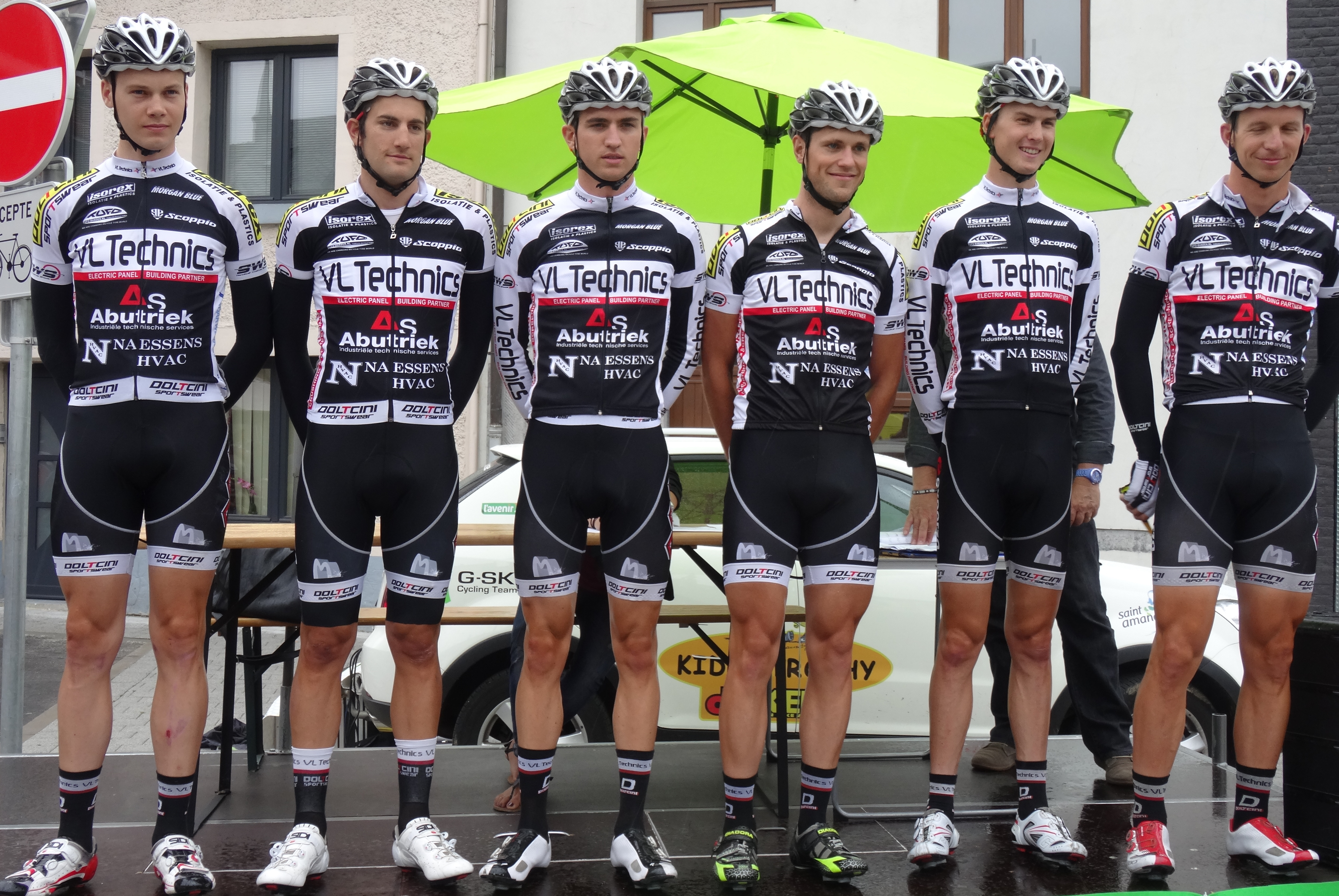 Reportage photographique réalisé le mercredi 6 août à l'occasion du départ de la première étape du Tour de la province de Namur 2014 à Jambes (Namur), Belgique.